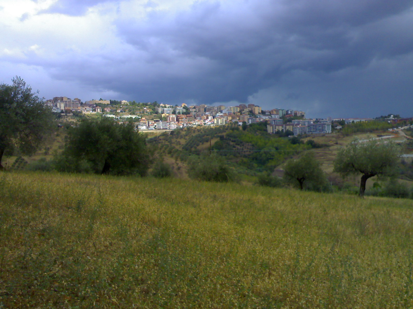 Chieti minacciata dalla pioggia, scattata da me personalmente